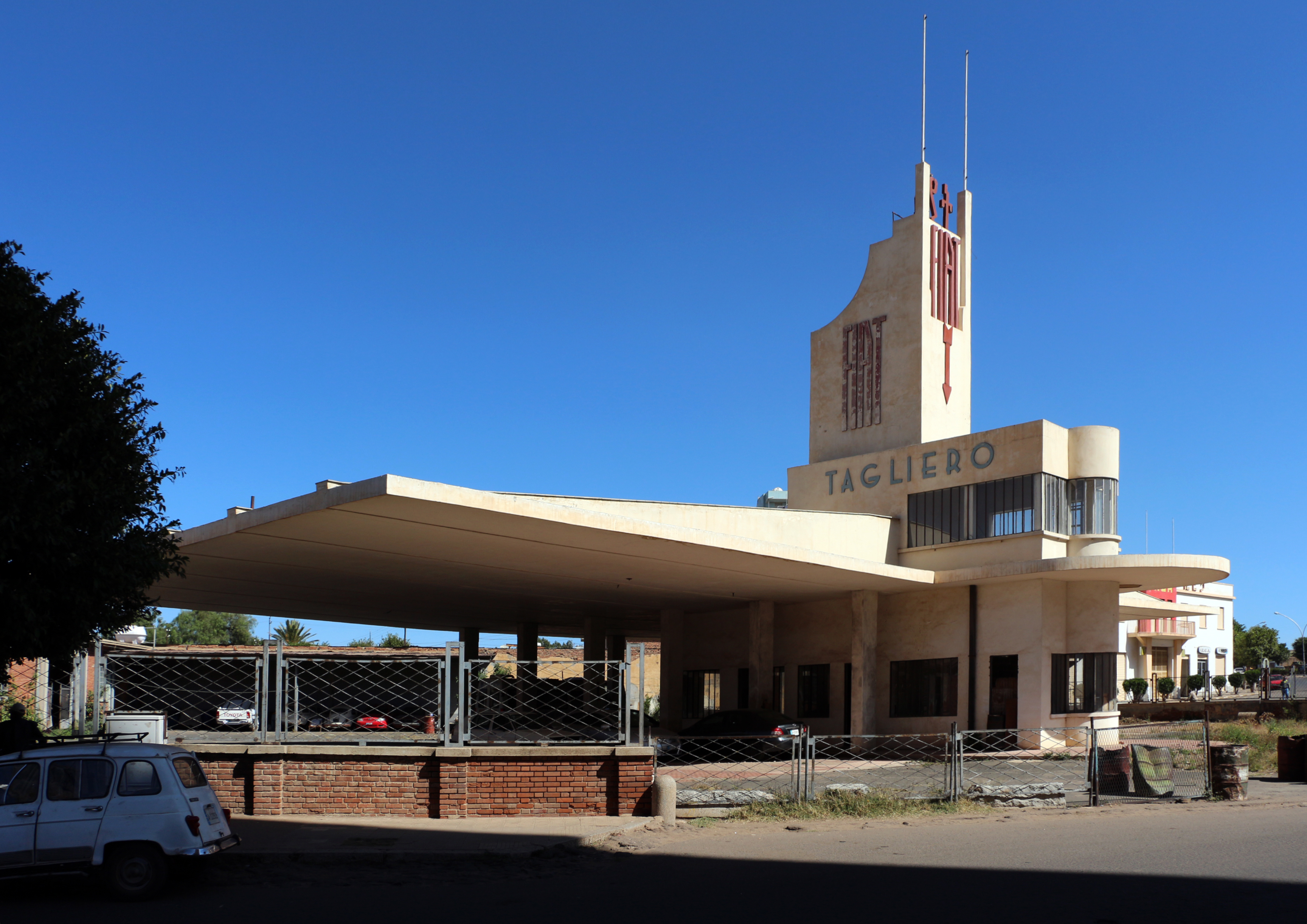 Fiat tagliero, 02.JPG